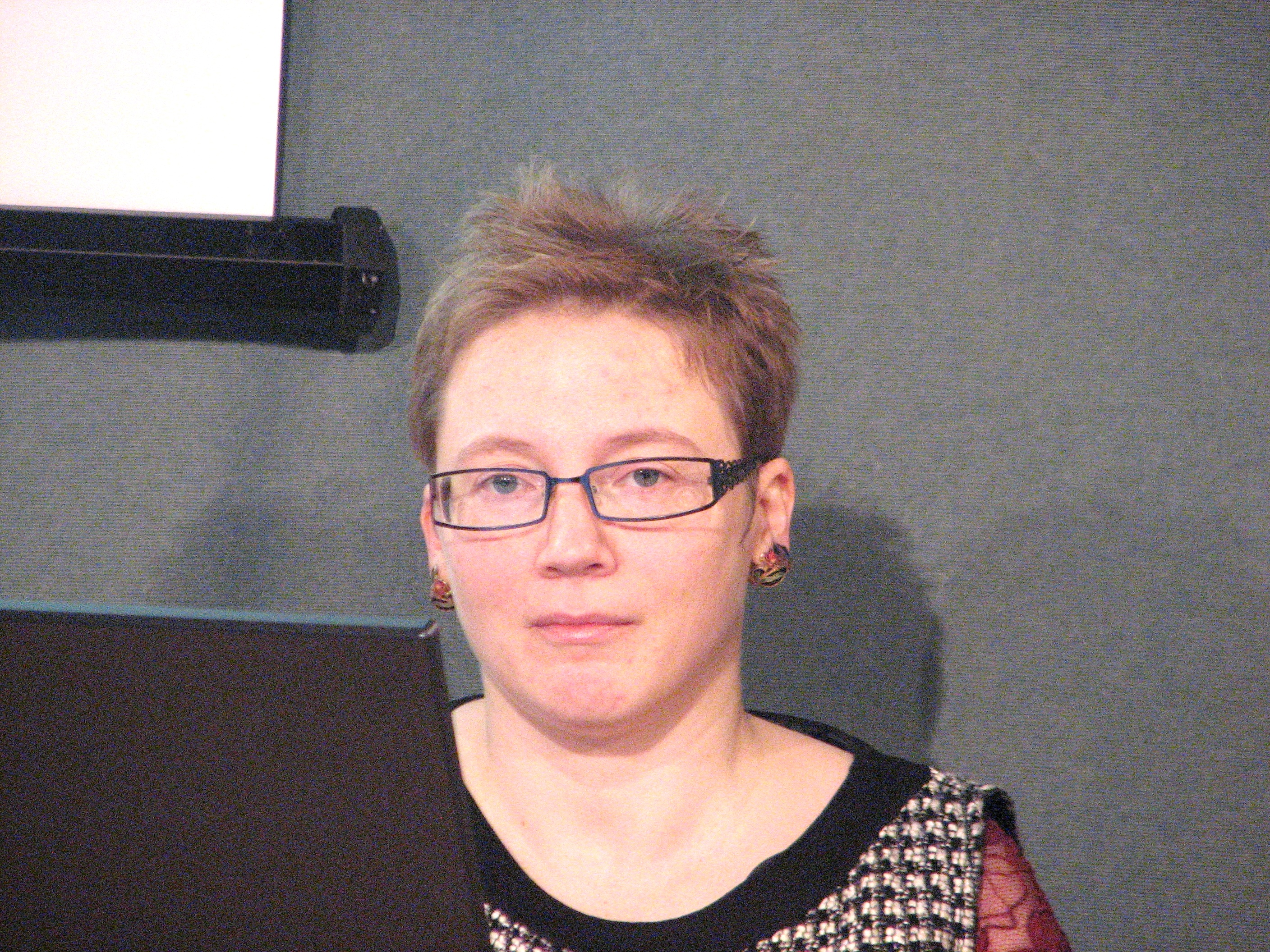 Katre Talviste A. H. Tammsaare Muuseumi 9. sügiskonverentsil